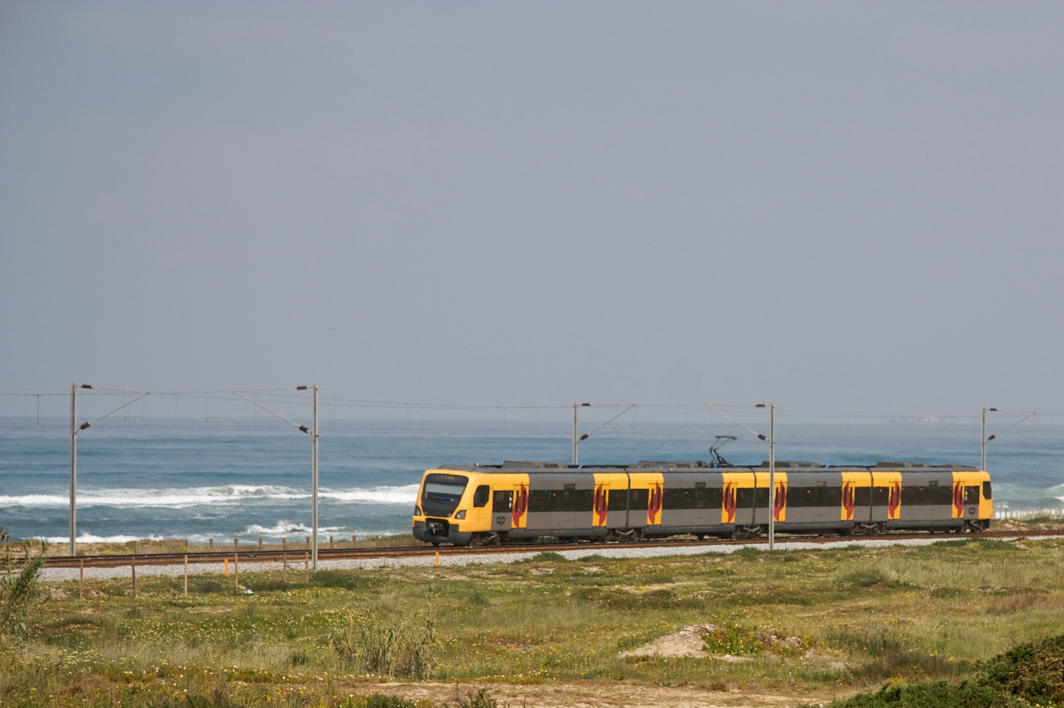 Tipo: Marcha de serviço [Porto • São Bento - Aveiro] Local: São Félix da Marinha [Linha do Norte, PK 318] Data e hora: 9 de Maio de 2009 [11h06] Material: Automotora 34xx [Unidade Múltipla Eléctrica]